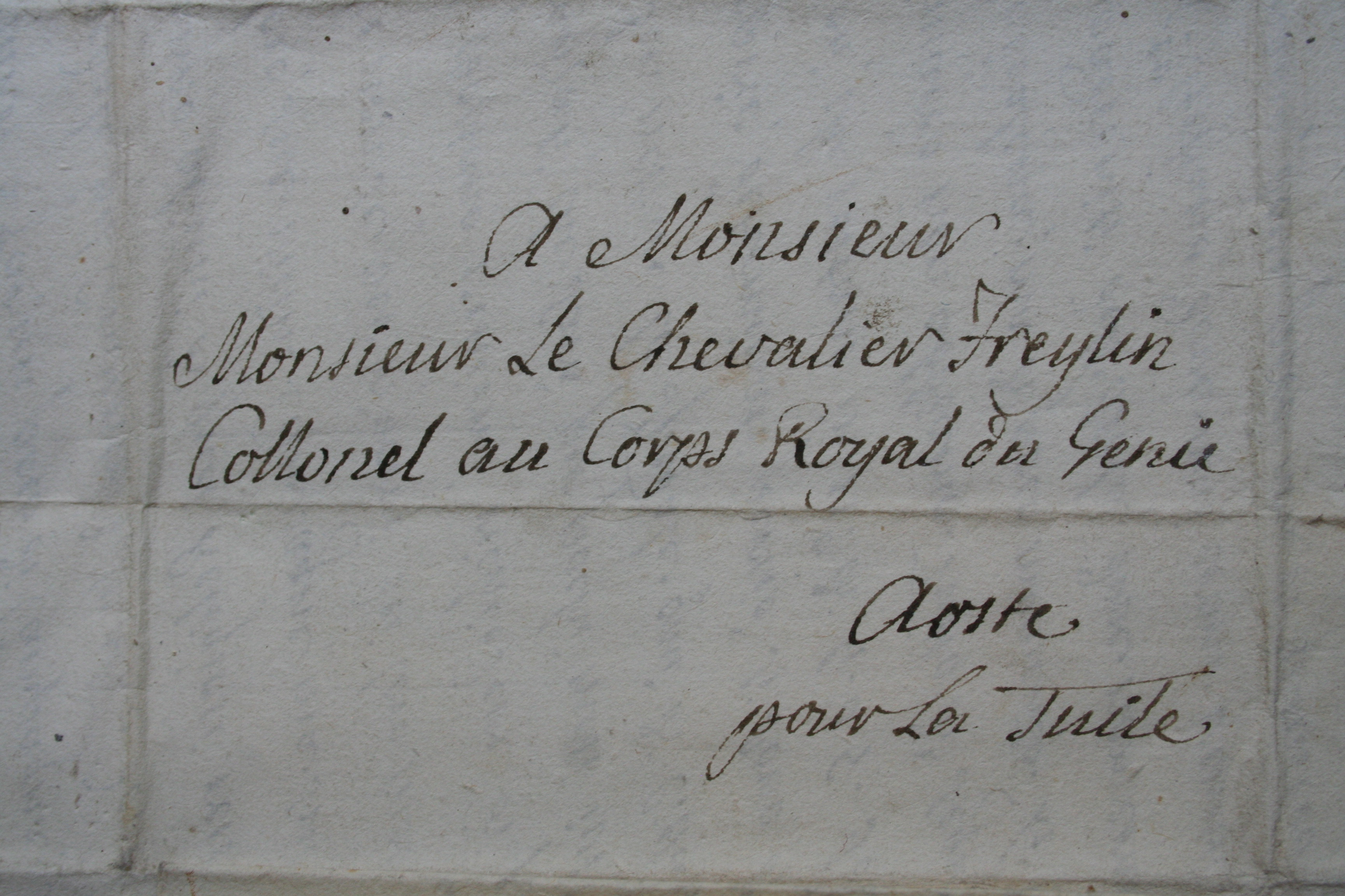 Lettre